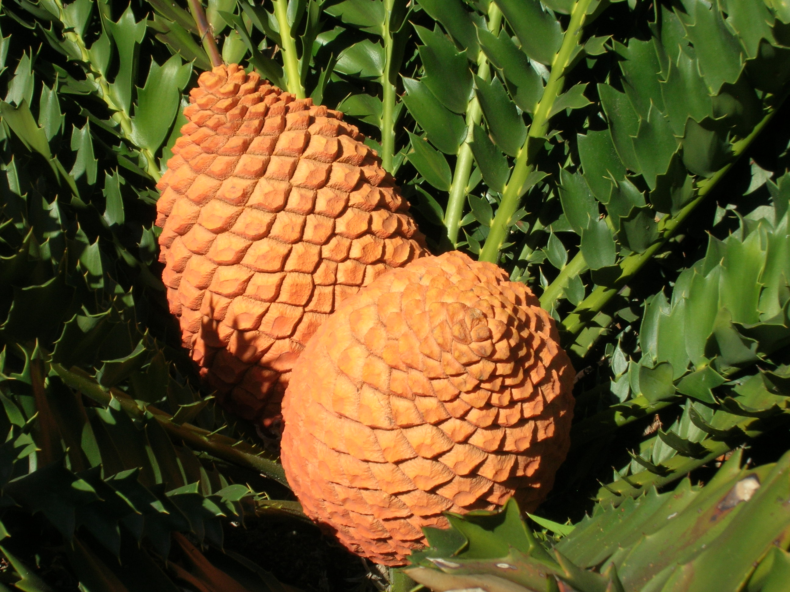 Encephalartos ferox (Zamiaceae) female plant